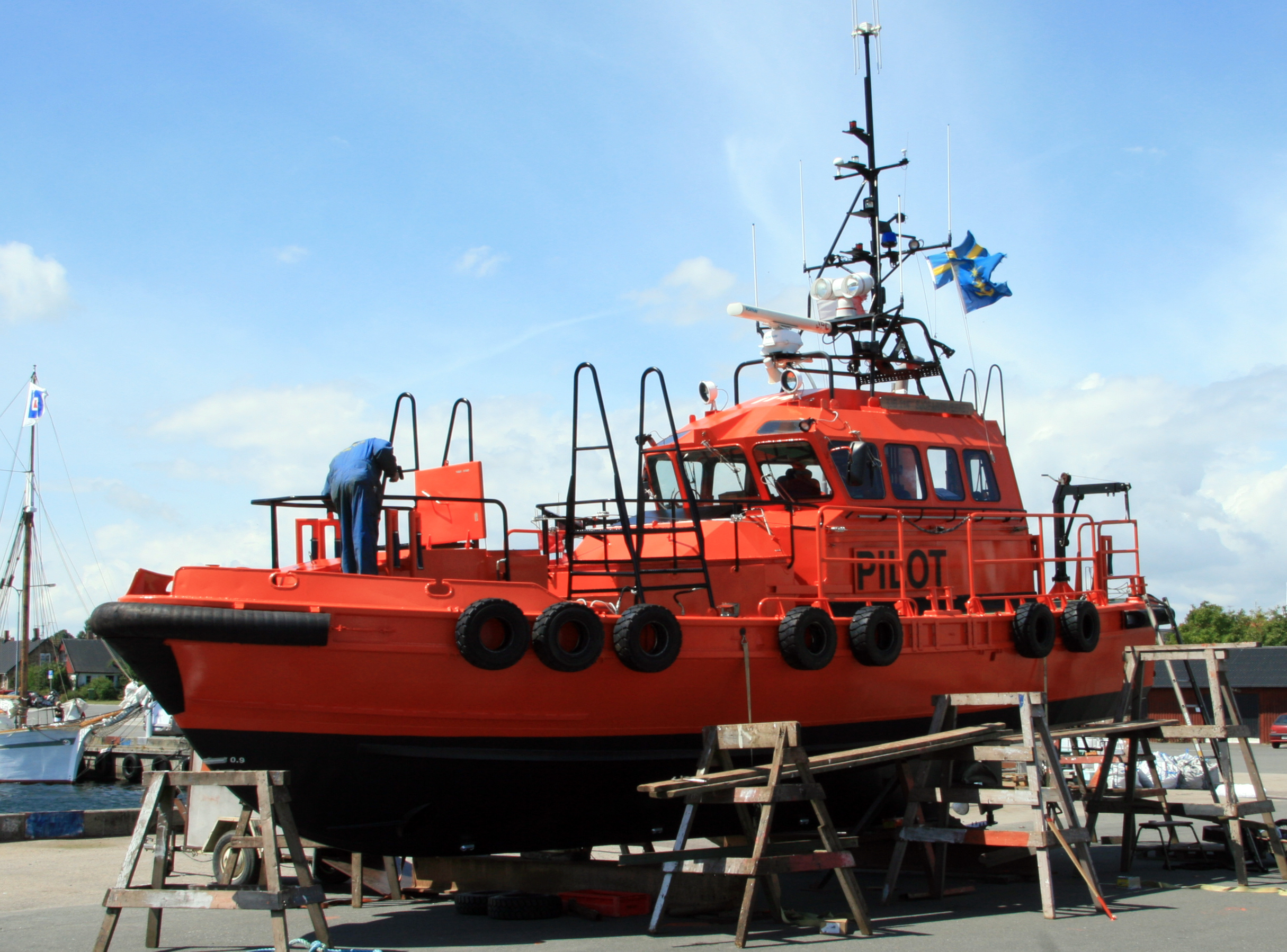 Pilot 114 SE i Skillinge, Simrishamn 16 juli 2008